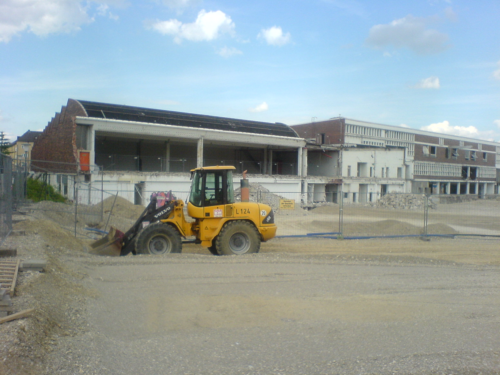 München — Abbruch der Agfa-Gevaert-Produktionsstätten in Giesing